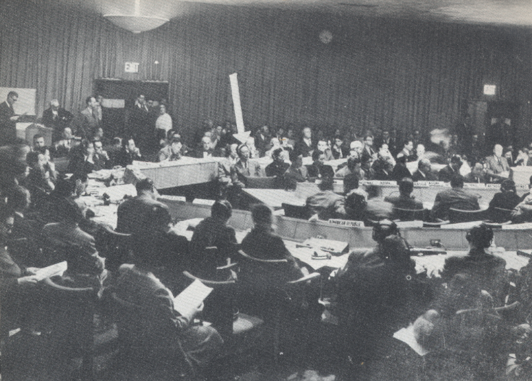 1952년 제3차 유엔총회에 참석한 장면과 장택상